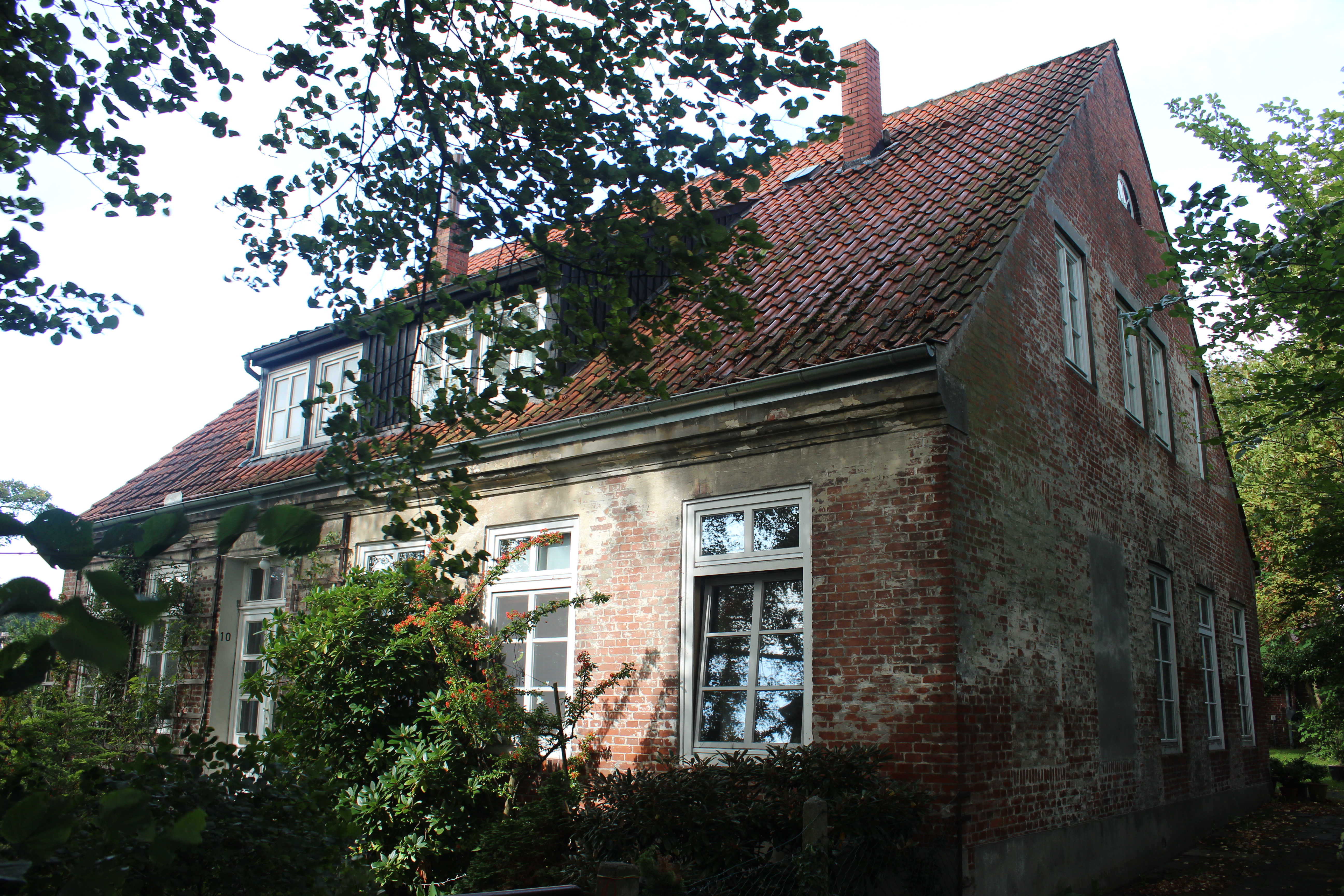 Schulhaus Aumund in Bremen, Borcherdingstraße 10.Das abgebildete Objekt ist ein geschütztes Kulturdenkmal in der Freien Hansestadt Bremen, mit der Nr. 1277 beim Landesamt für Denkmalpflege registriert.